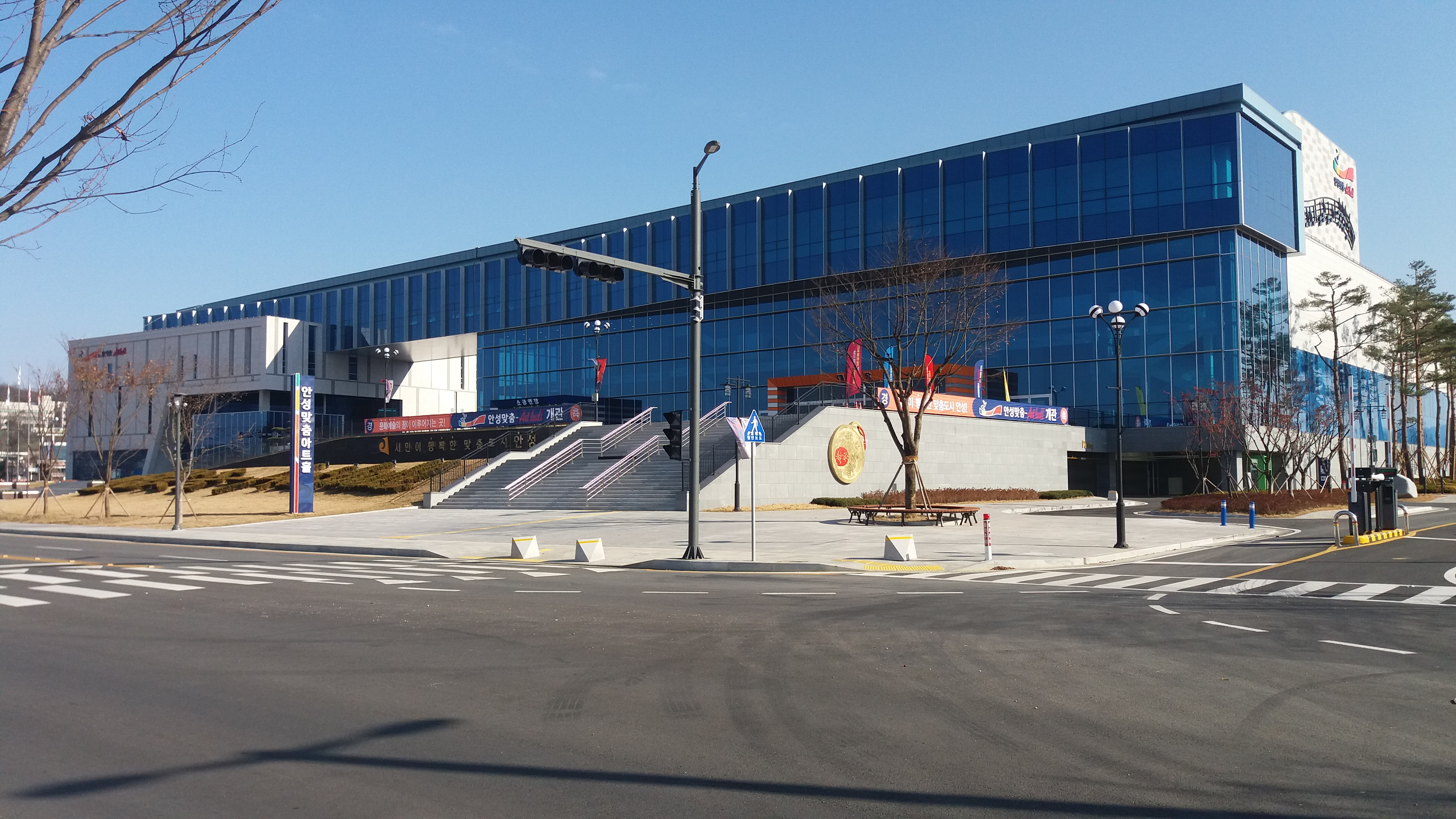 안성마춤아트홀